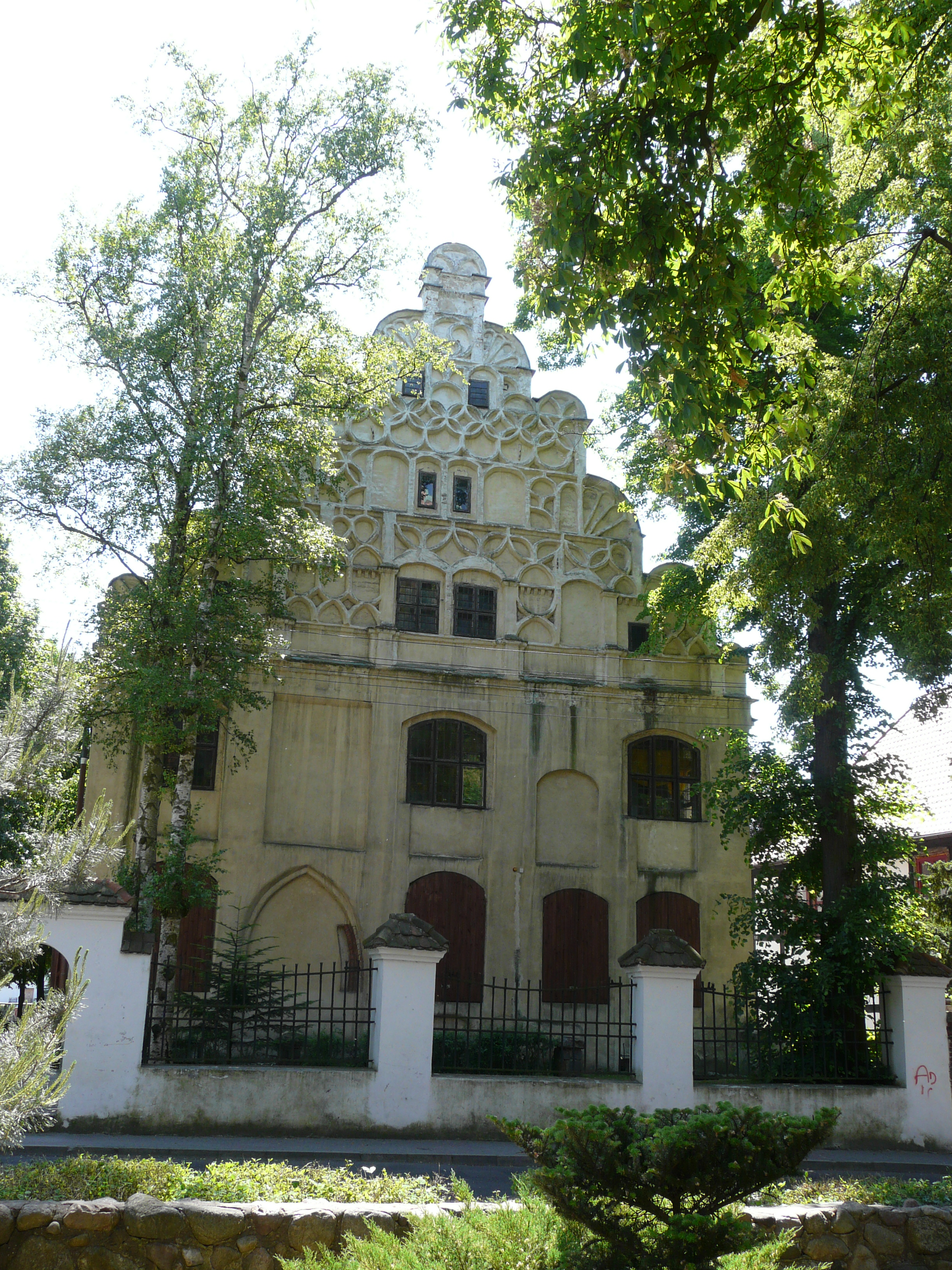 Dwór Kurii Biskupiej w Kamieniu Pomorskim